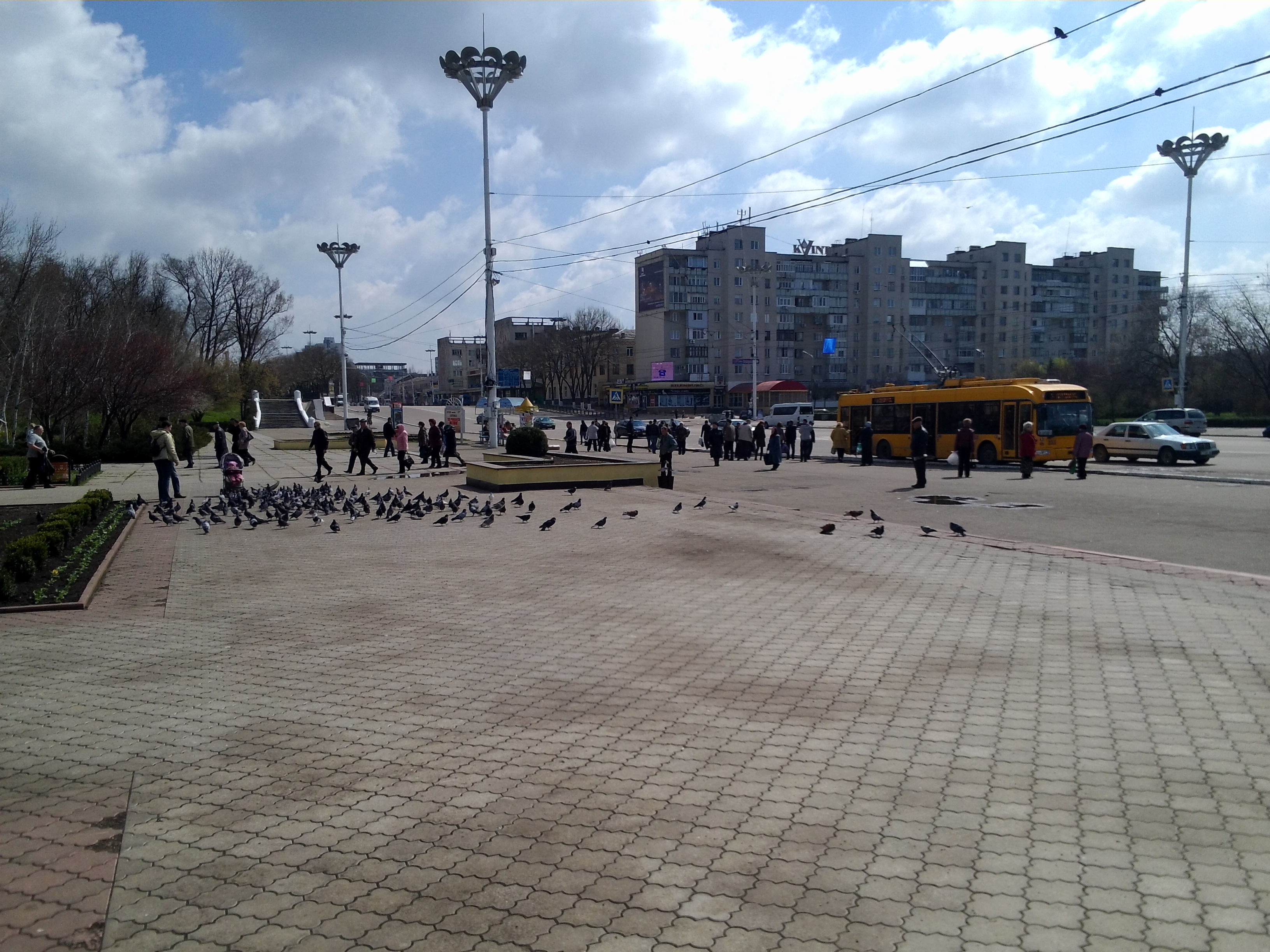 м. Тирасполь